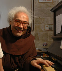 Fr Armando Pierucci OFM